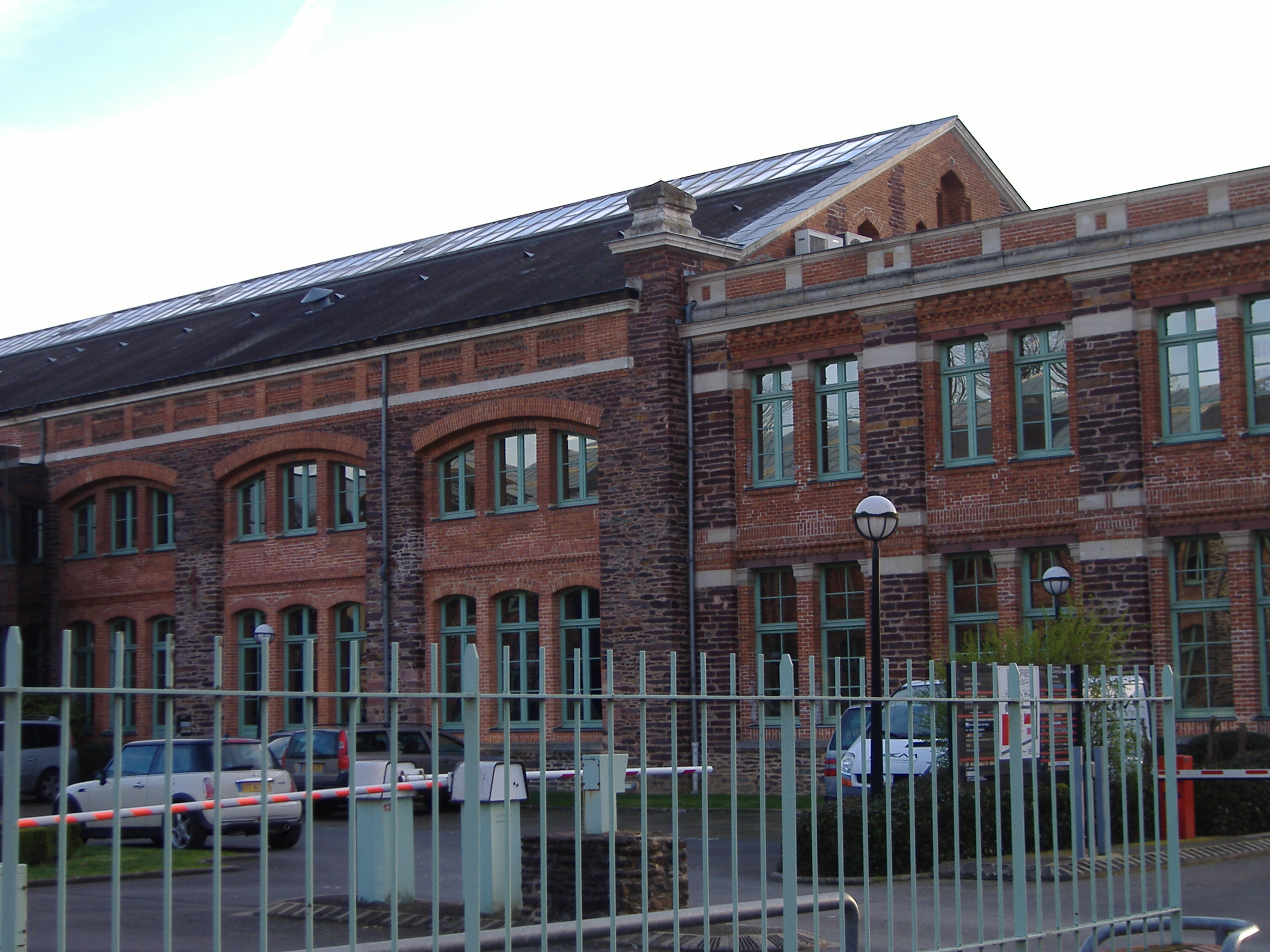 Ouverts lors de l'Ere Industrielle, ces locaux entre usine, bureaux et bâtiment public aujourd'hui rénovés sont occupés par le [CNRS].